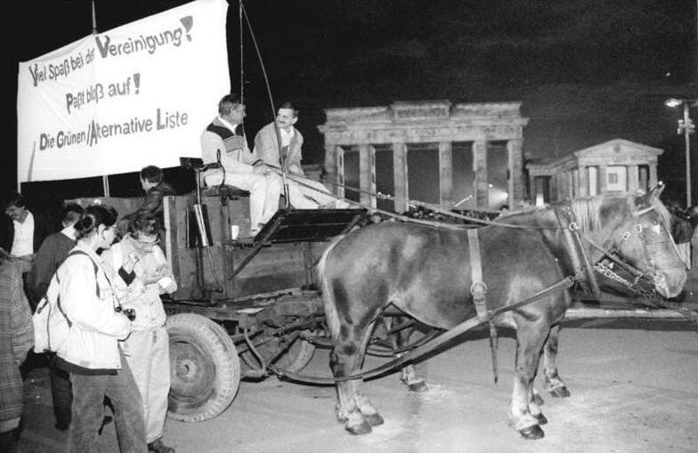 ADN-ZB Grimm 2.10.1990-Berlin: Vereinigung Anläßlich der Vereinigungsfeierlichkeiten zogen die Grünen mit einem Pferdegespann zum Brandenburger Tor.